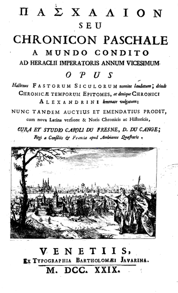 Пасхальная хроника. Издание 1729 года.